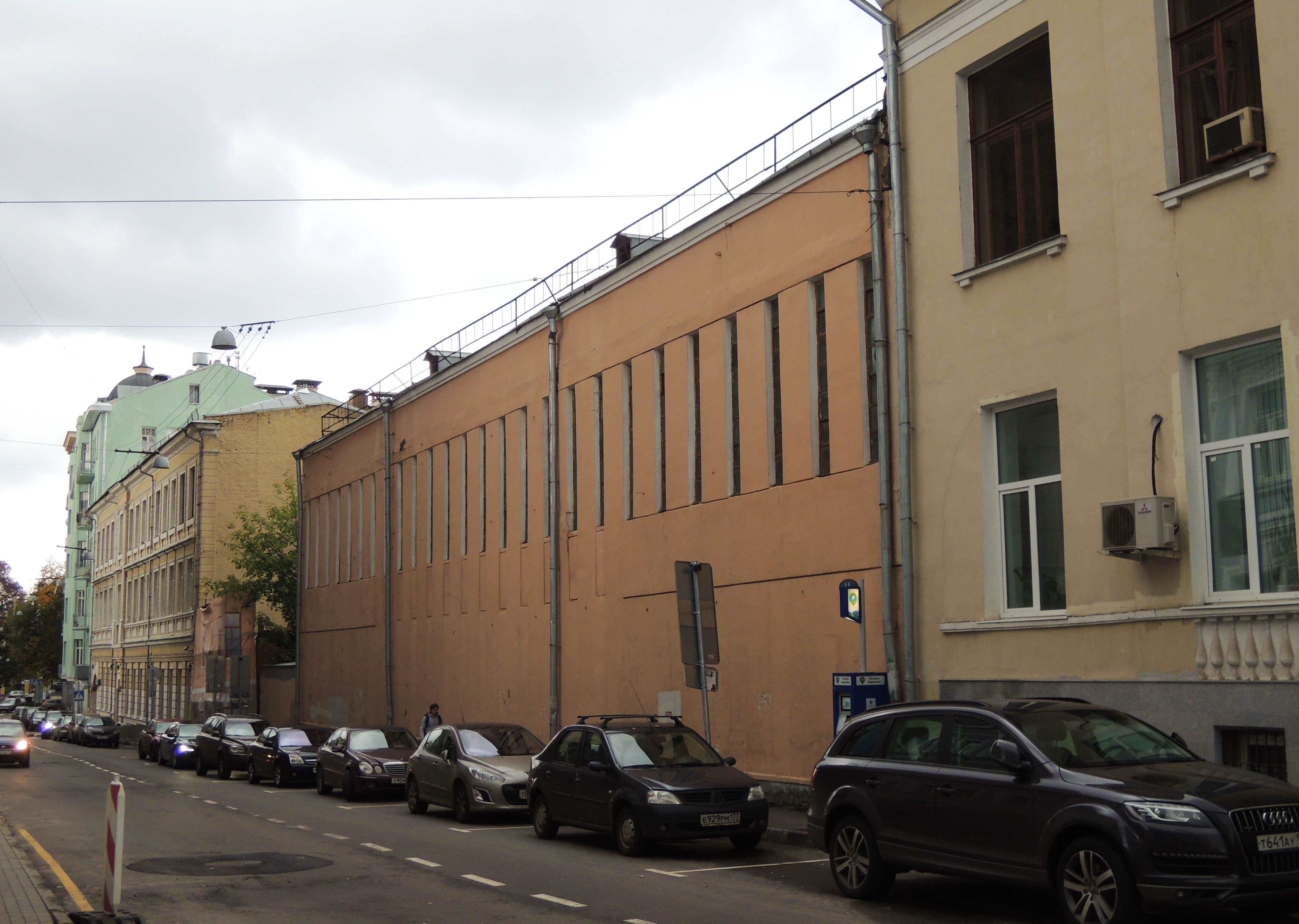 Знаменский переулок